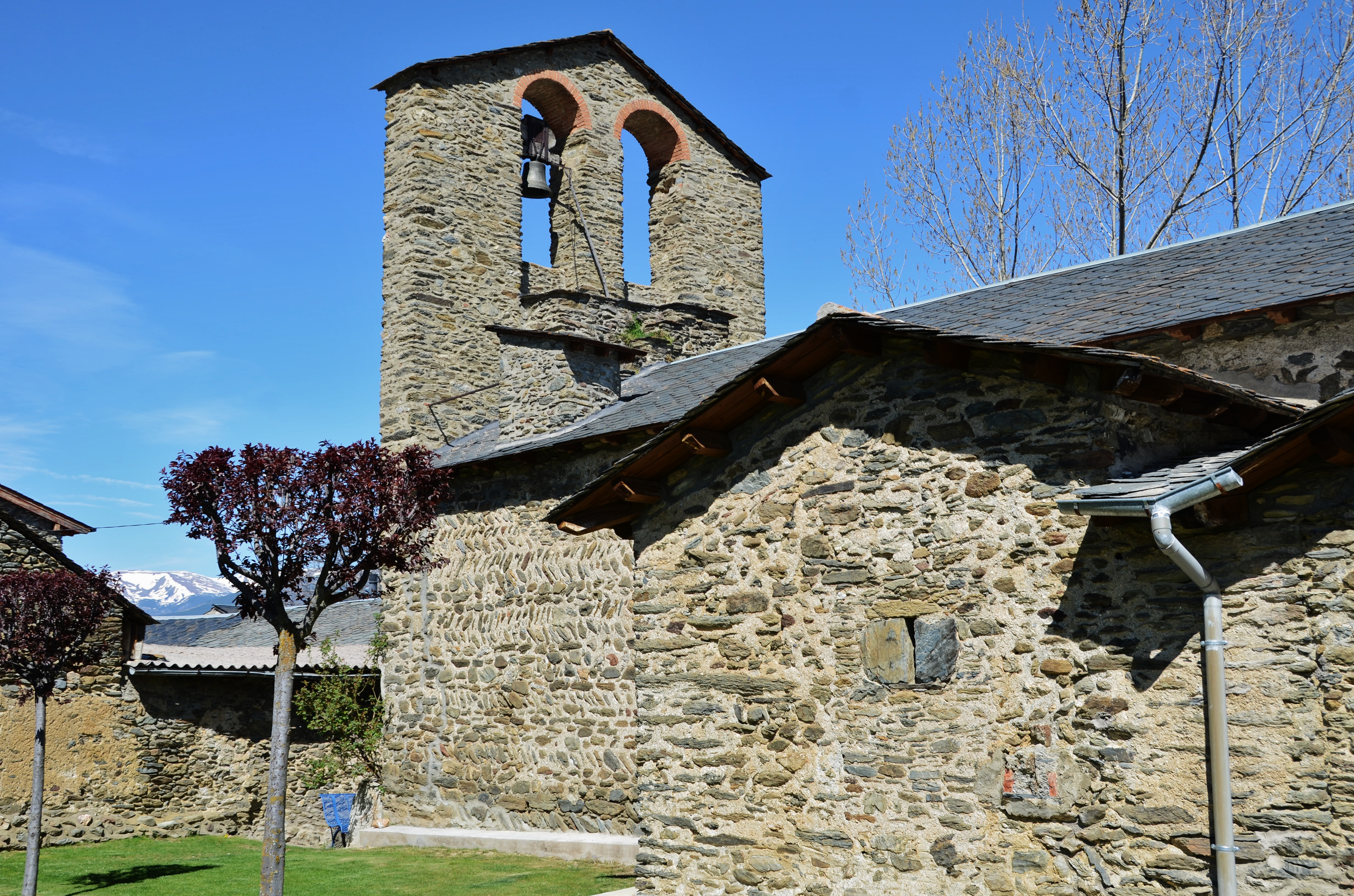 Església de Sant Andreu de Vilallobent, Puigcerdà, La Cerdanya